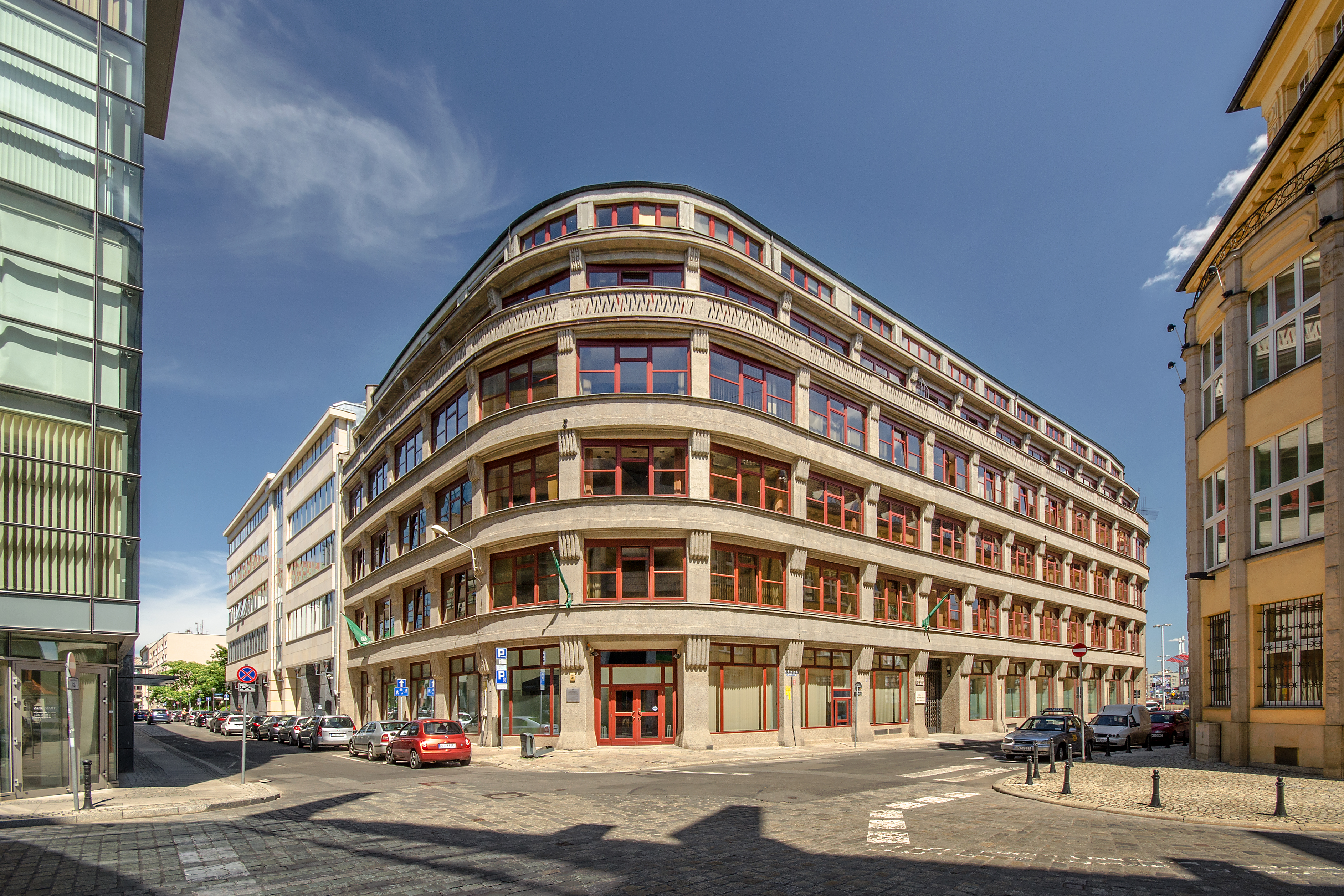 Wrocław, biurowiec "Miastoprojekt", pocz. XX